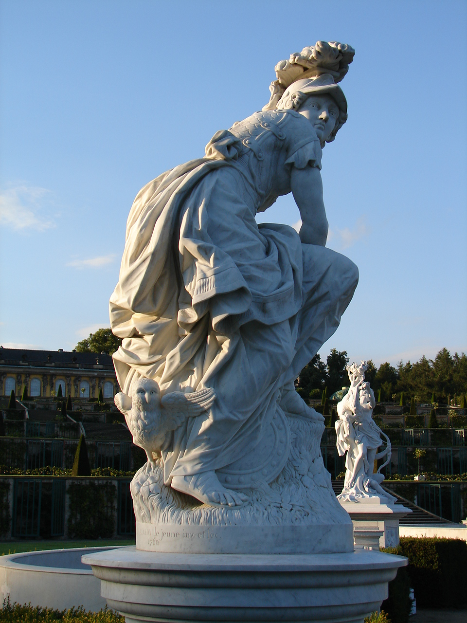 Statue d'athena (minerve) parc sanssouci de Potsdam. Sculteur: François Gaspard Adam